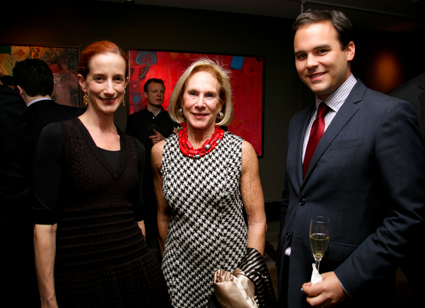 Vanessa Friedman (Financial Times), Amanda Urban (ICM) and David Gelles (Financial Times)